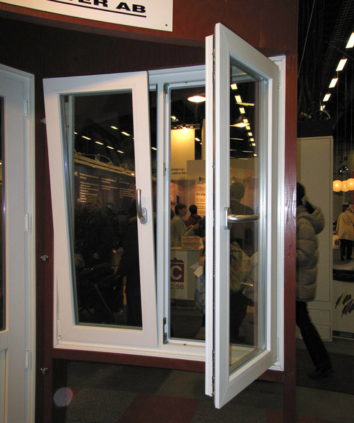 双层窗，顾震弘摄于2005年3月。